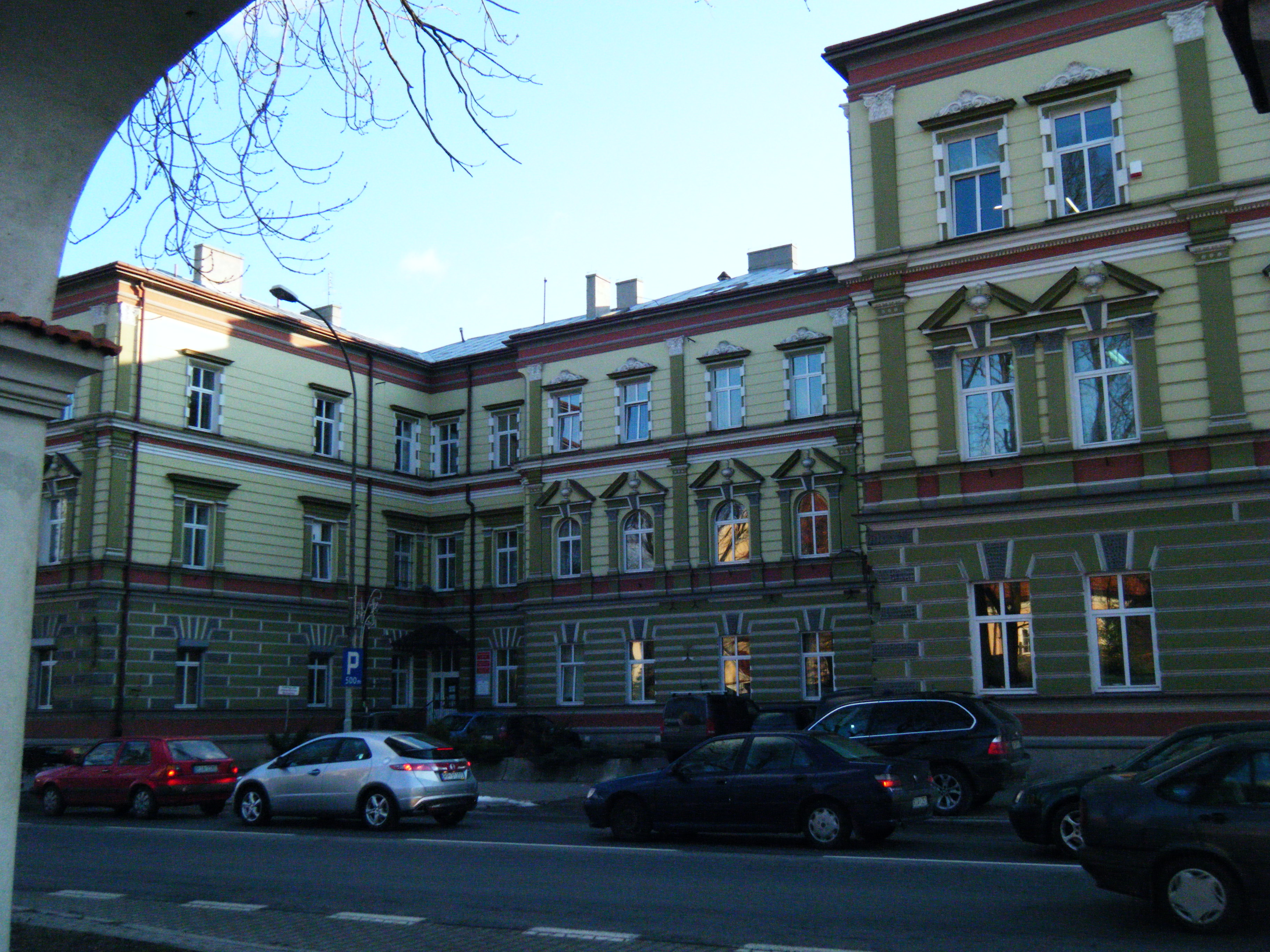 Starostwo Powiatowe w Jarosławiu (zabytek nr A-893 z 29.10.1998)